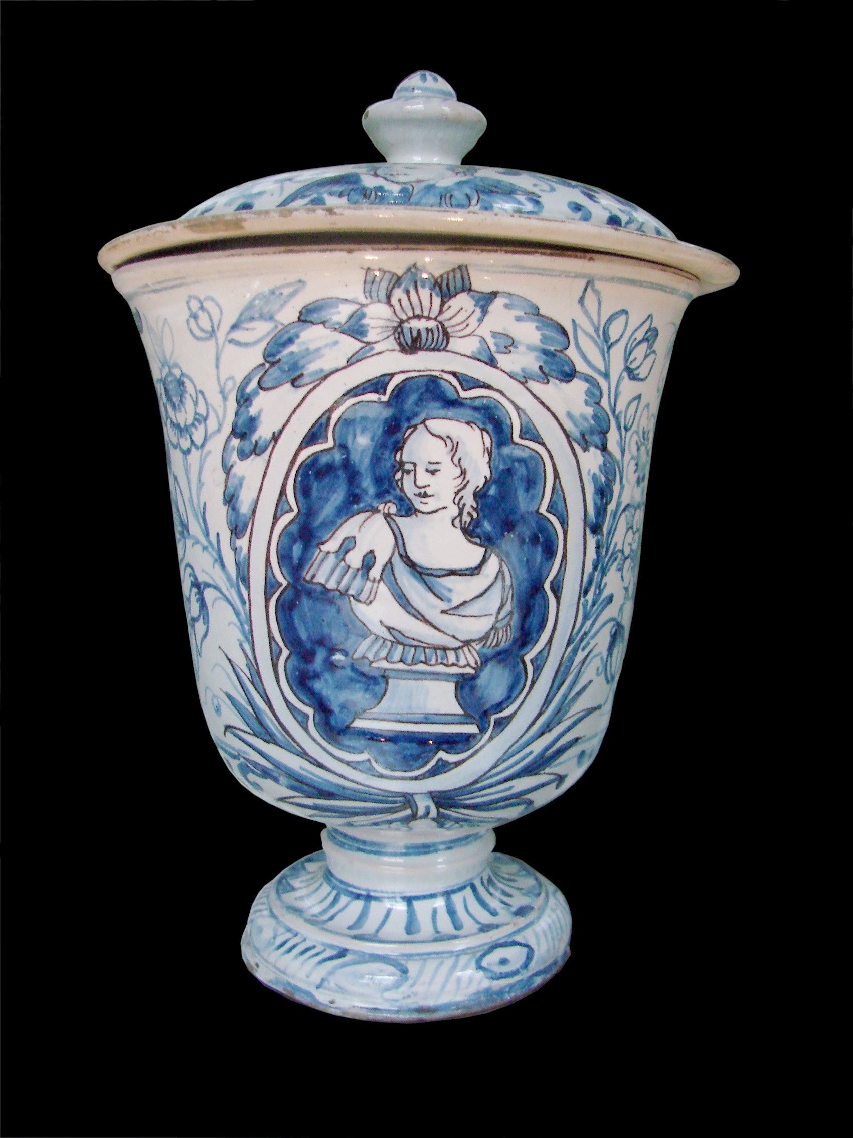 Coupe couverte, décor grand feu en camaïeu bleu, milieu du 18ème siècle, Ligurie, Italie. Musée des Beaux-Arts de Lille.